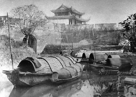 宁波城墙长春门